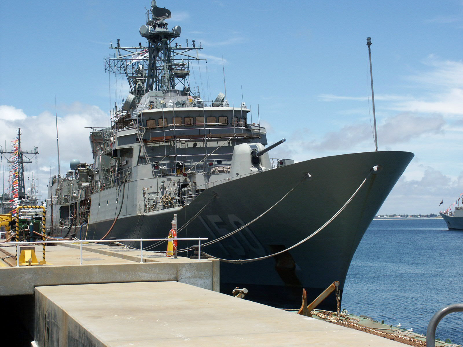 HMAS Anzac at Fleet Base West.